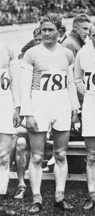 Olympische Spelen 1928 Amsterdam, Nederland. Atletiek. Finse marathonlopers. Ilmari Kuokka.